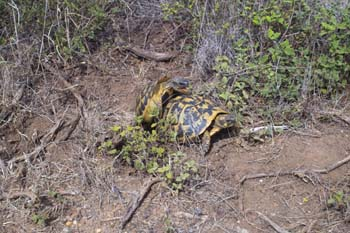 WegehauptThhPaarung